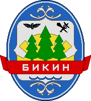 Герб Бикинского района Хабаровского края